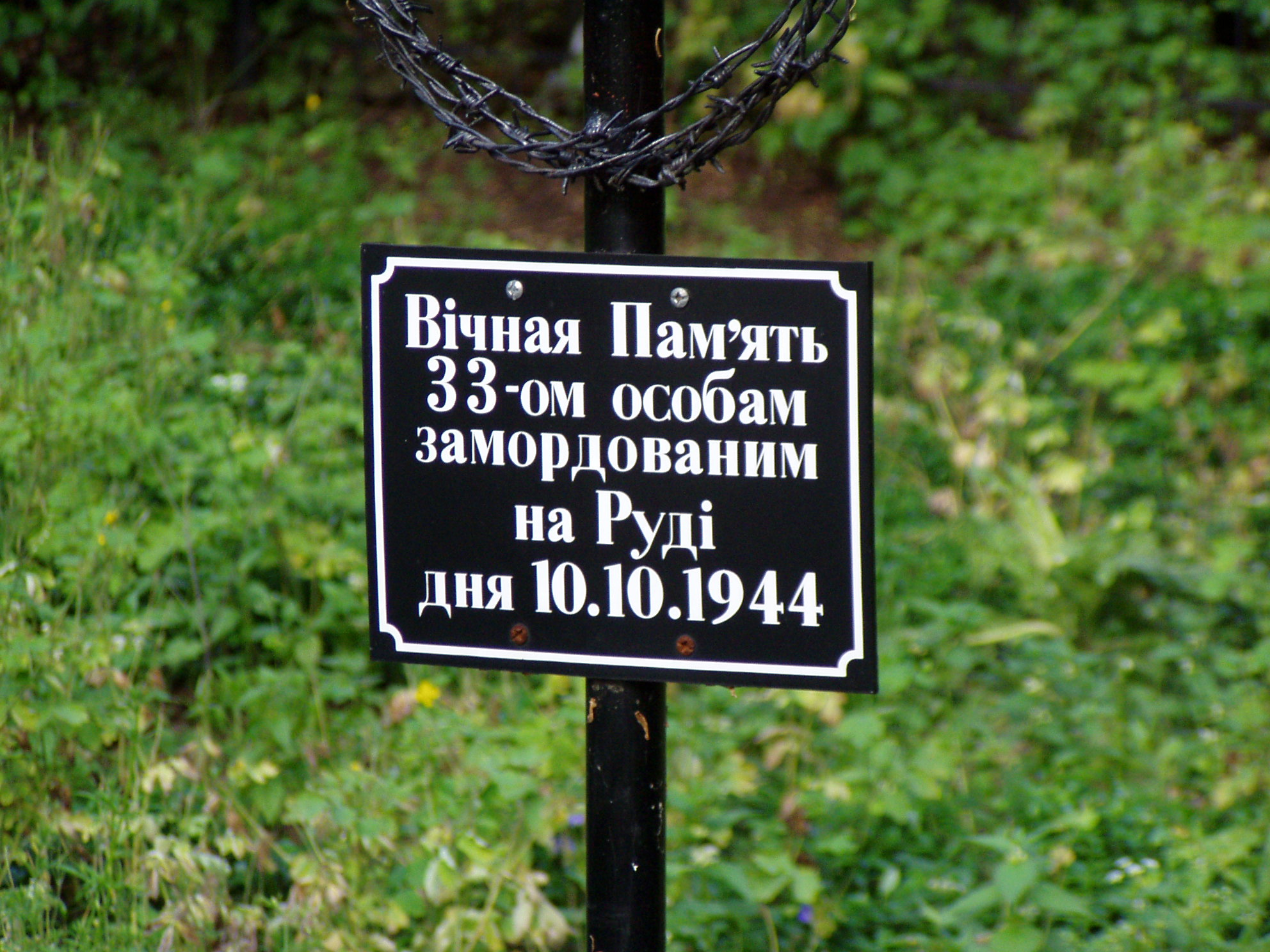 Mogiła pomordowanych przez funkcjonariuszy MO mieszkańców Lublińca.